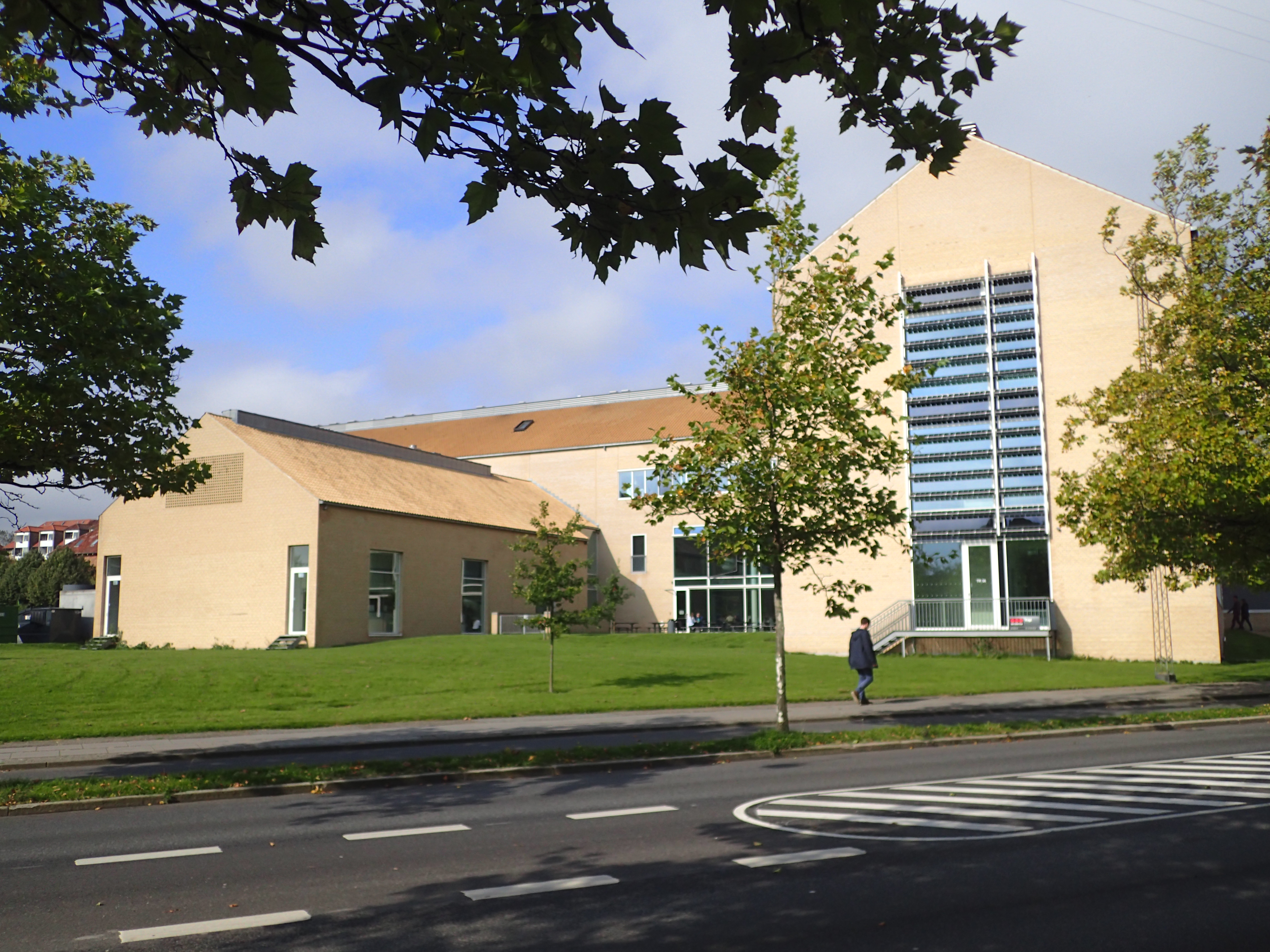 The iNano House set fra Langelandsgade.